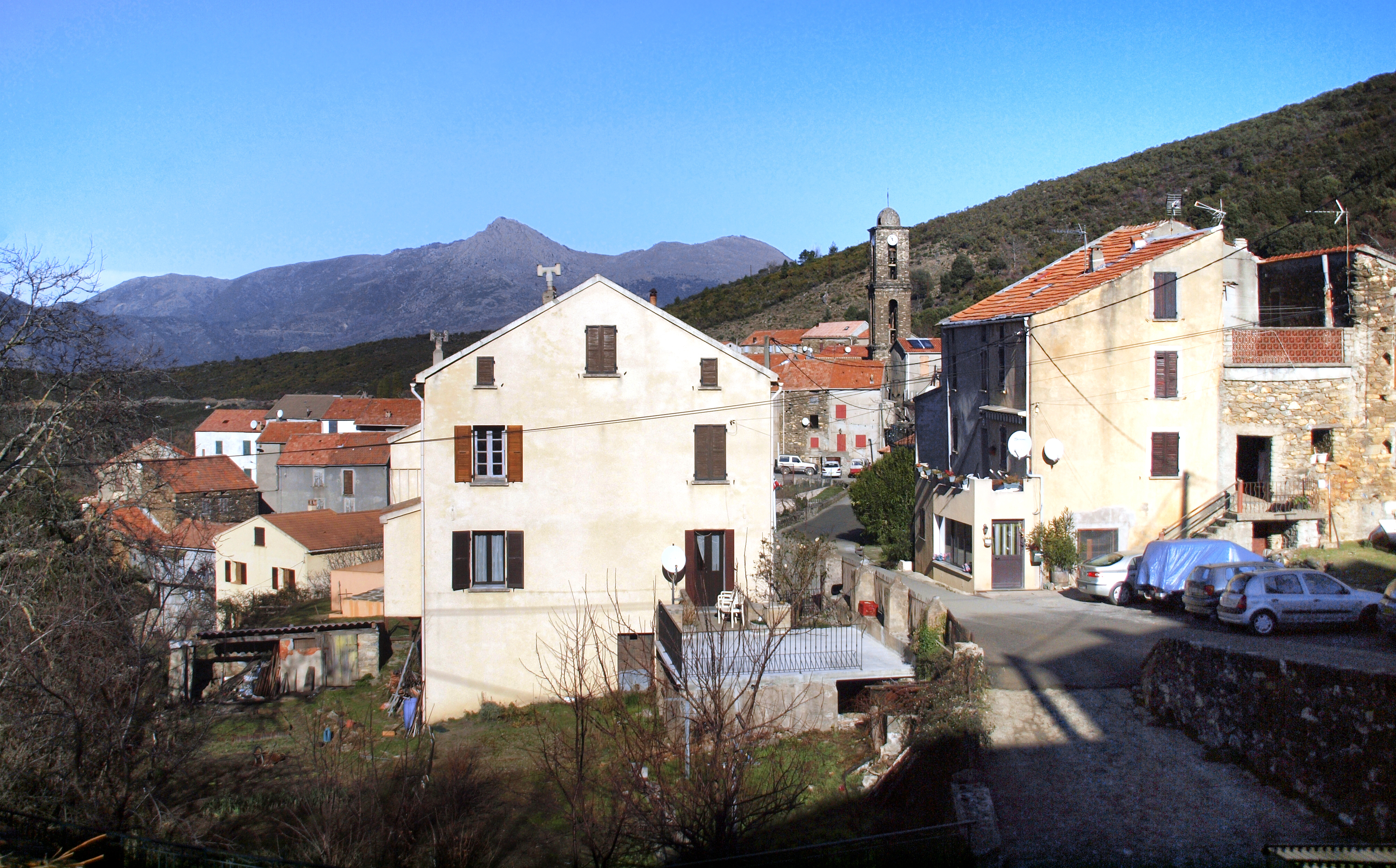 Erbajolo, Bozio (Corse) - Vue du village